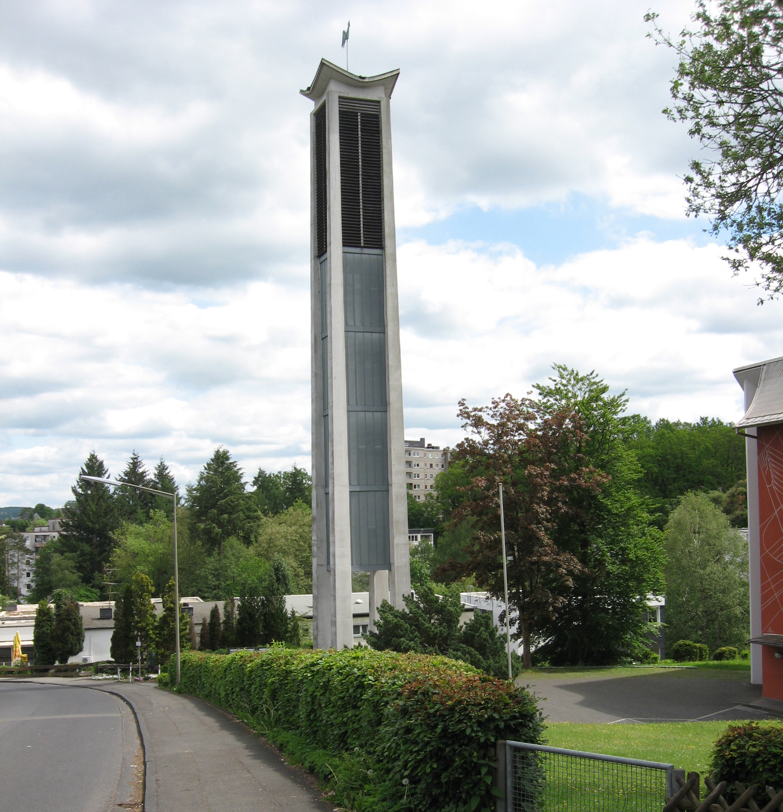 Besonderheit von Sankt Maria Immaculata ist der freistehende Kirchturm.